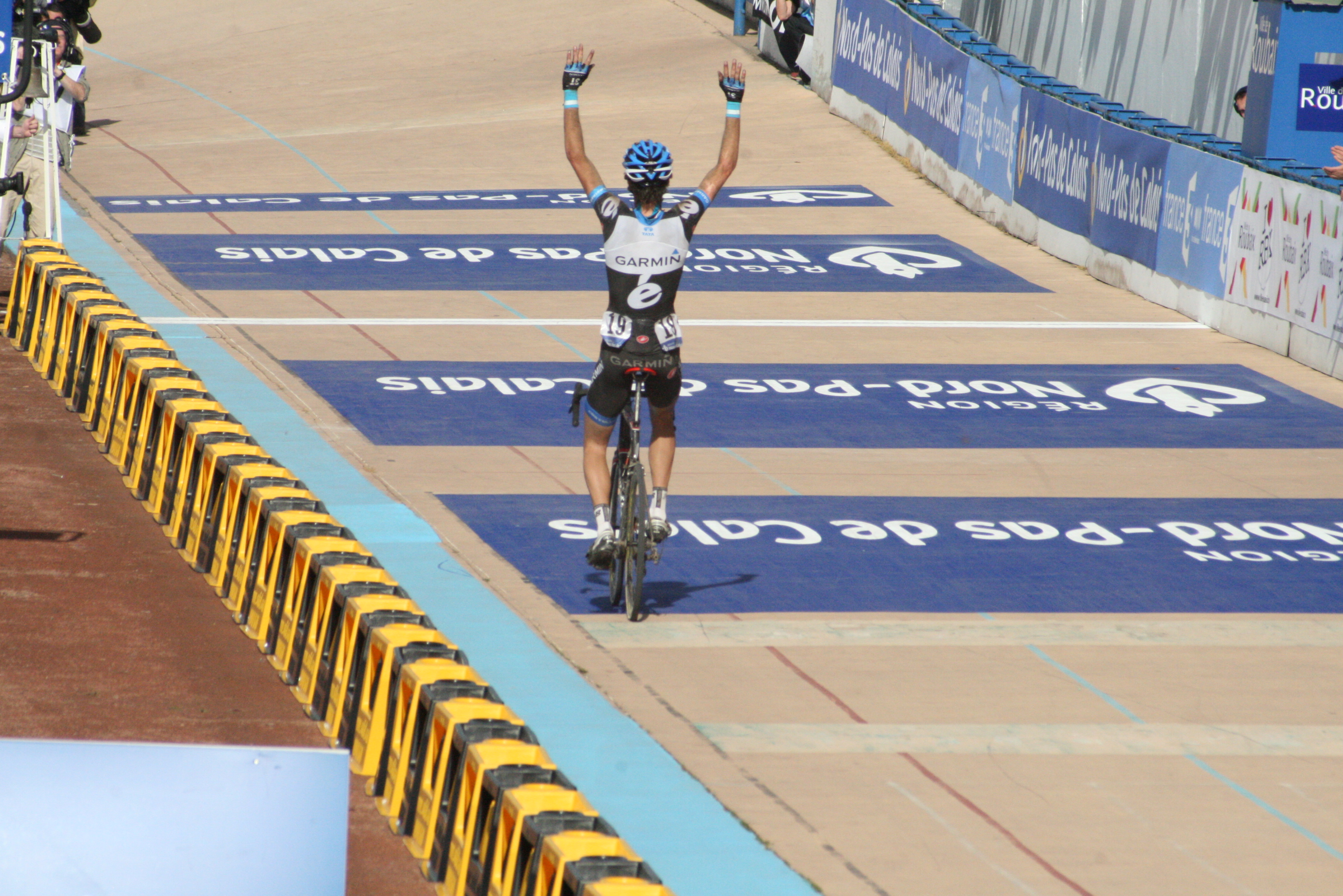 Arrivée de Paris-Roubaix 2011 au vélodrome de Roubaix Johan Vansummeren